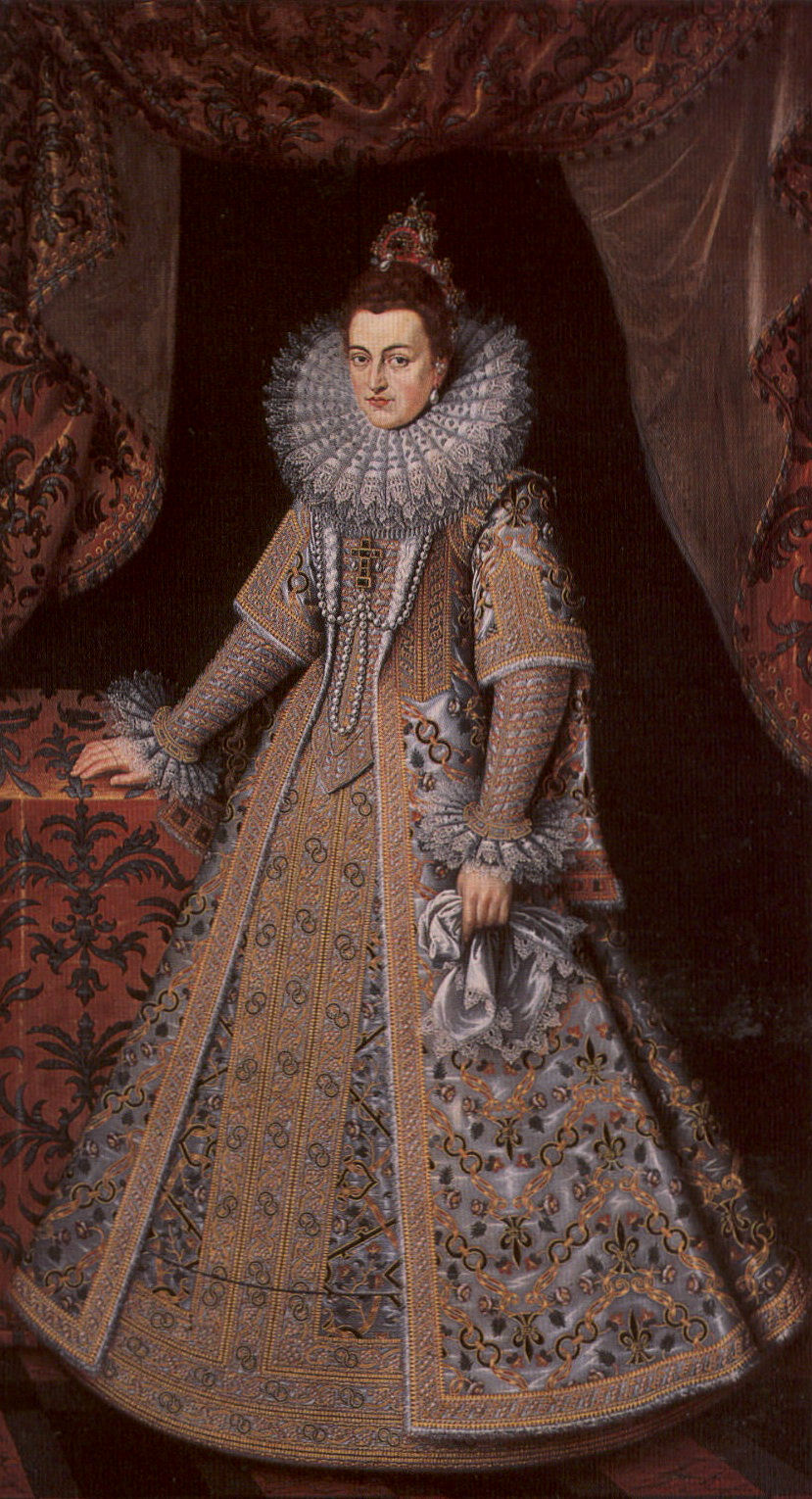 Landvoogd Isabella Musees Royaux des Beaux-Arts (Brussels, Belgium)